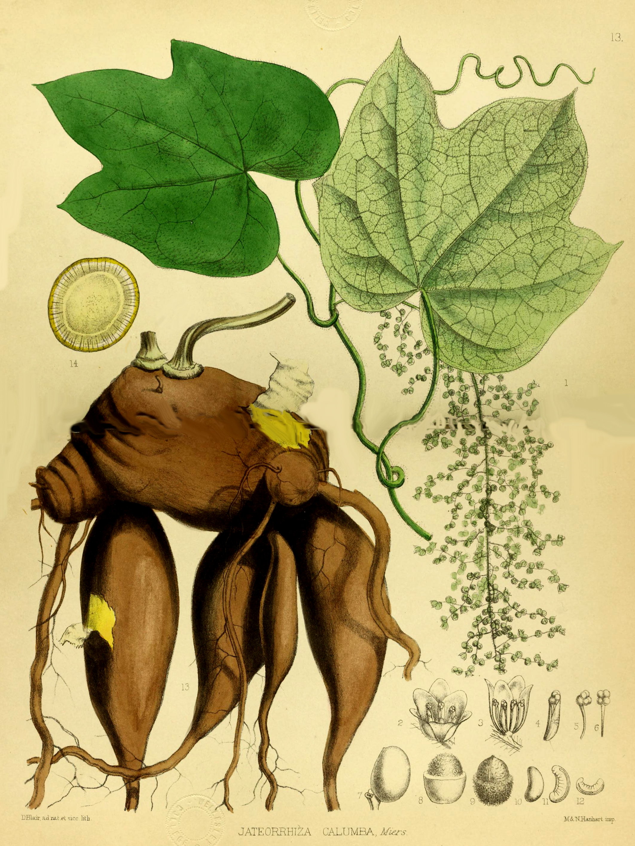 Abbildung der Kalumba (Jateorrhiza palmata)